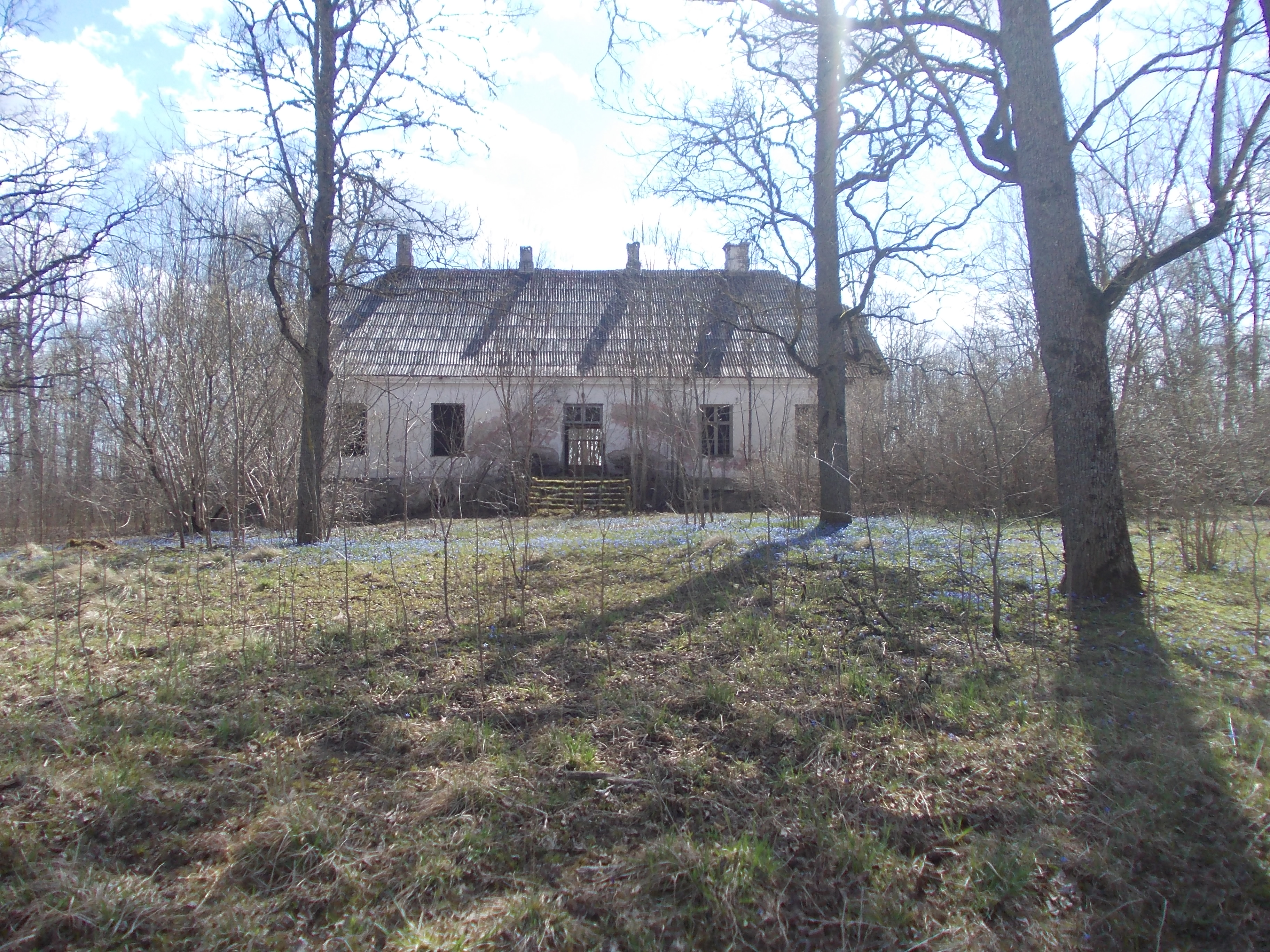 Soosaare põlispuude grupp, vaade selle keskel olevale Soosaare mõisa peahoonele